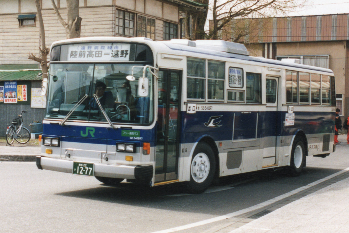 遠野線 陸前高田行き 遠野駅前にて 岩手22き１２７７